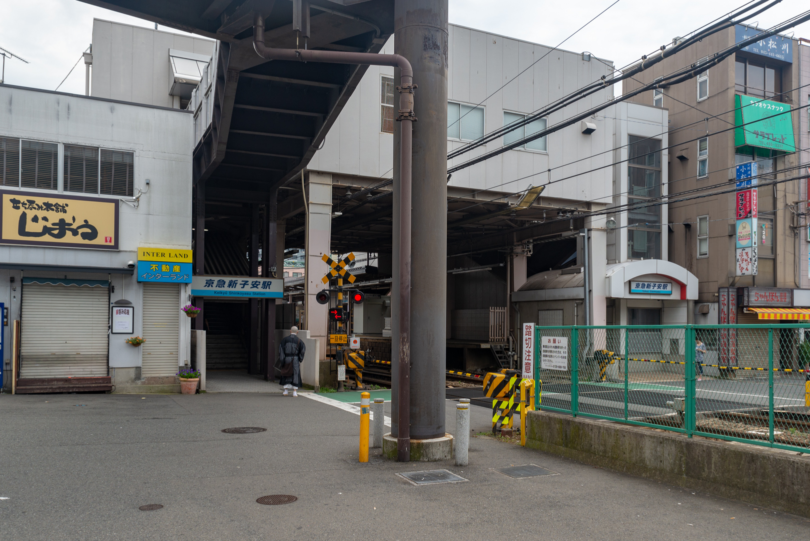 京浜急行電鉄株式会社京急本線京急新子安駅駅舎